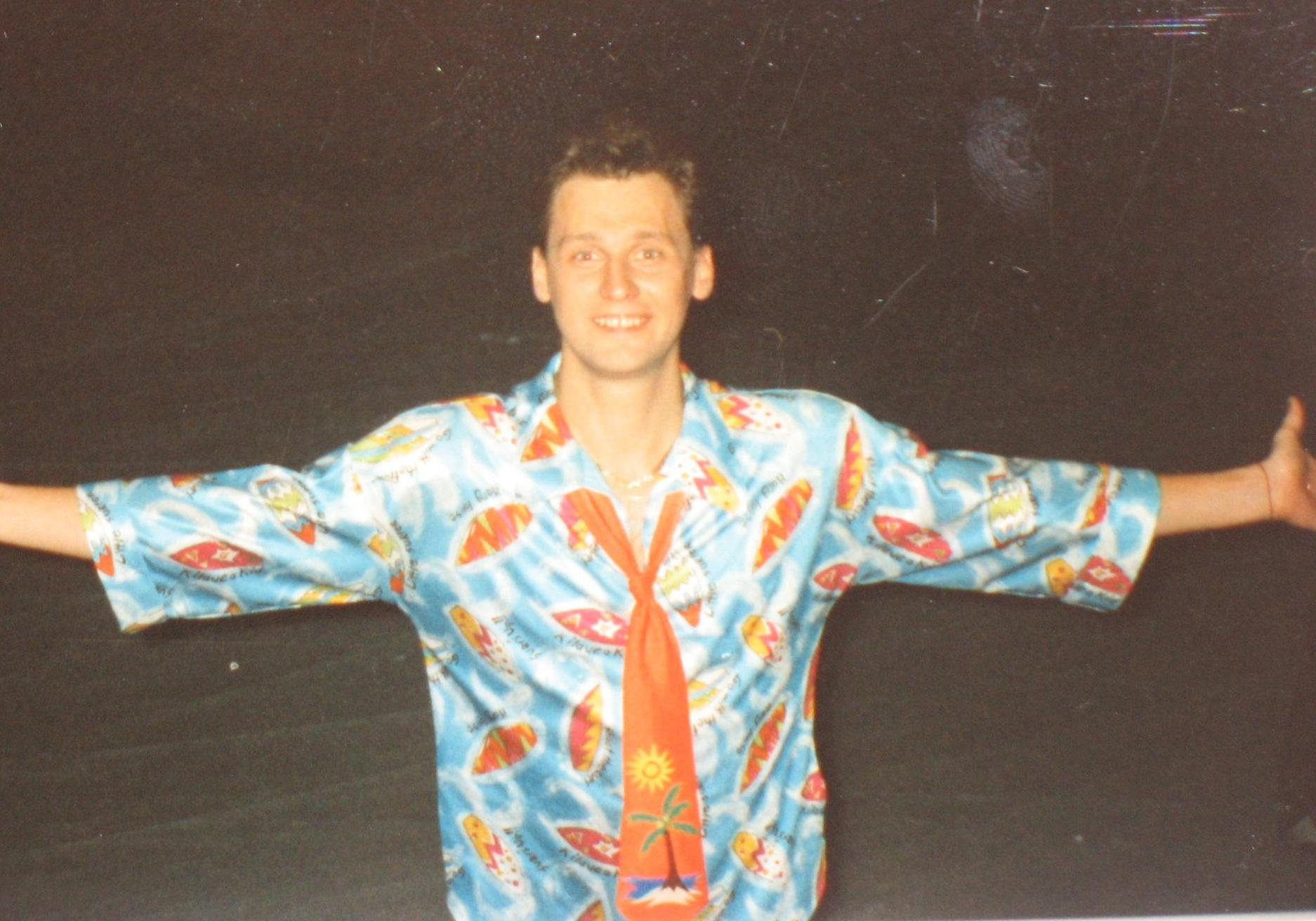 Vikor Petrenko, Weiden, 1995 eigenes Bild